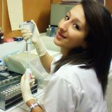 imene dans laboratoire